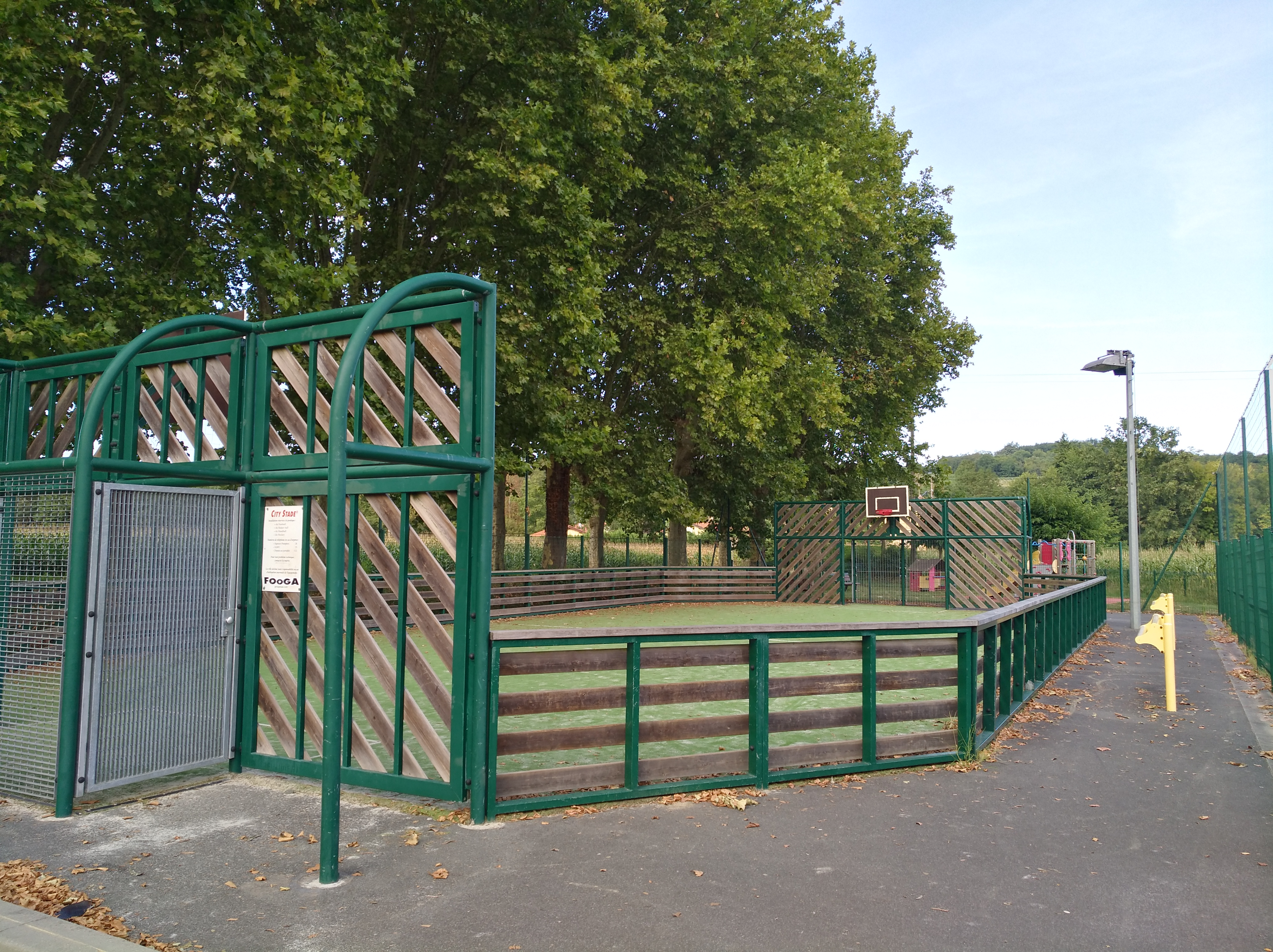 City stade au Breuil (Rhône, France).